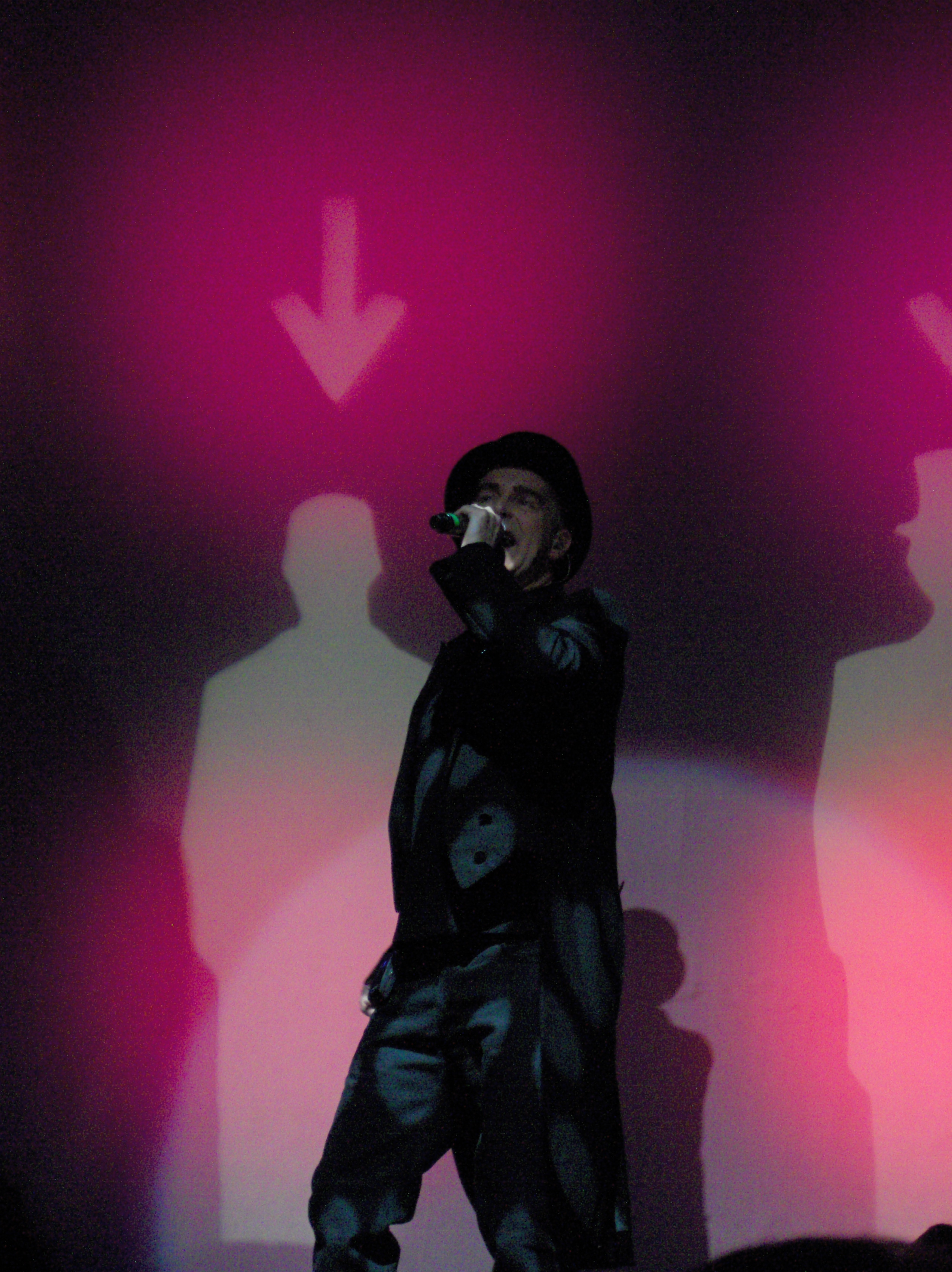 Pet Shop Boys live in Copenhagen